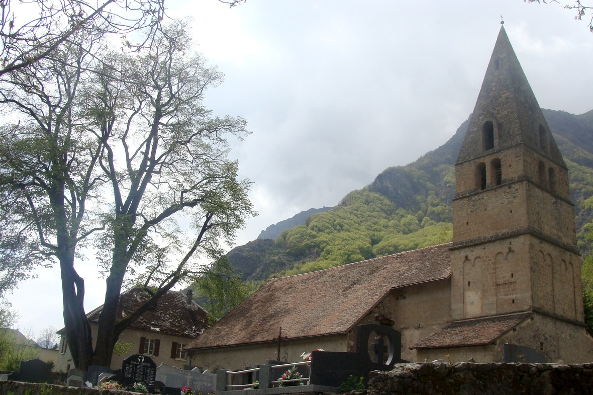 L'église de Saint-Maurice-en-Valgodemard (Hautes-Alpes), clocher et toiture du flanc sud, vus depuis le cimetière. À gauche, le "tilleul de Sully".